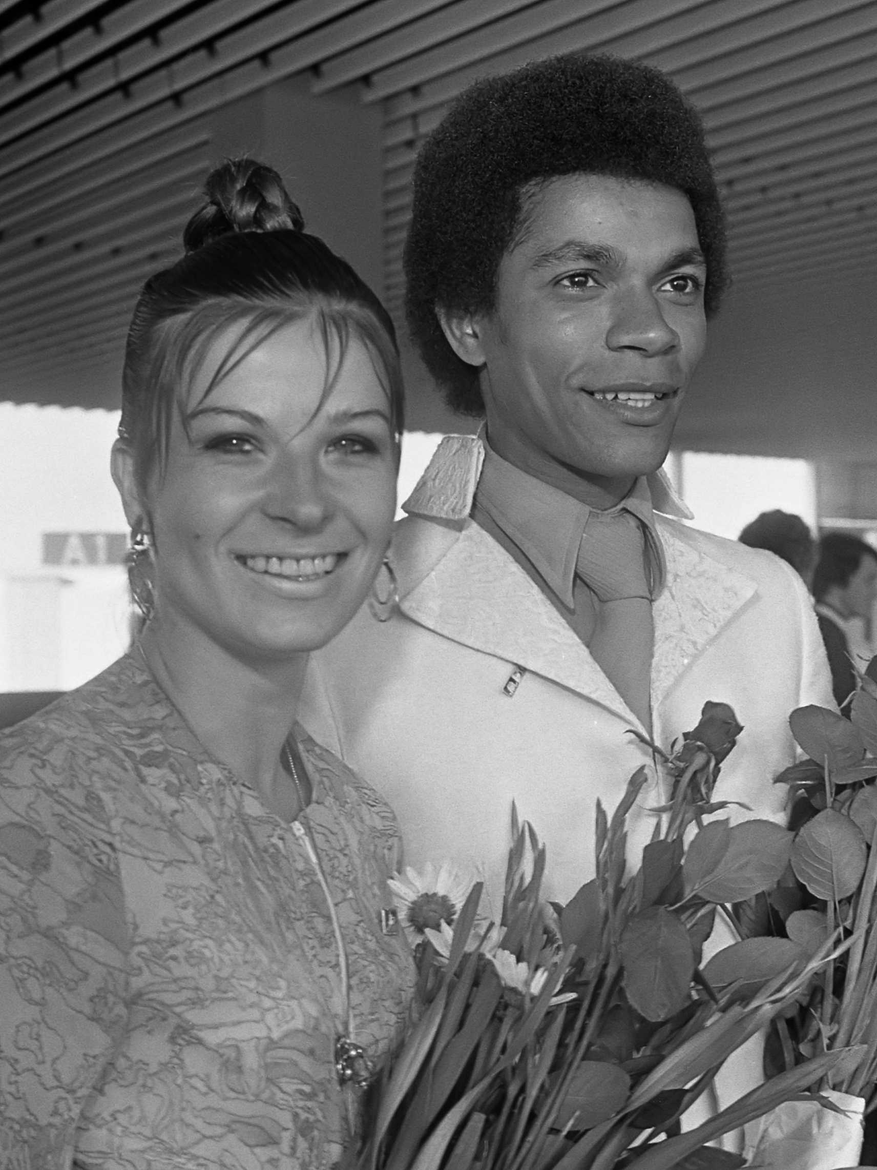 Danspaar Olga de Haas en Sylvester Campbell terug uit Moskou bij aankomst op Schiphol. Ontvangst met bloemen 7 juli 1969